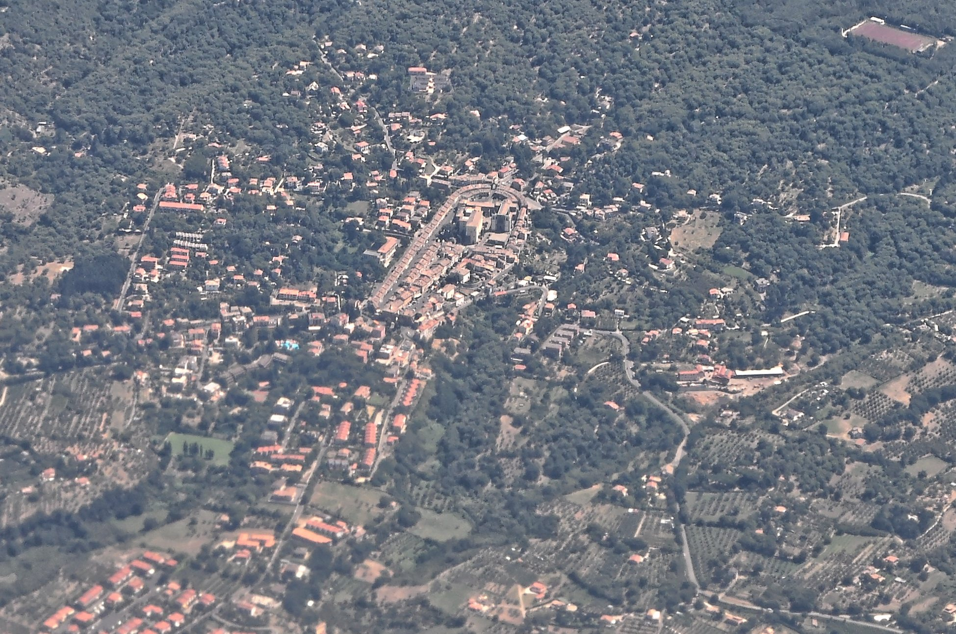 Bilder vom Flug -Rom-Düsseldorf-Hamburg 2013 Dieses Foto entstand in Zusammenarbeit mit Stadtbesichtigungen.de Die Seiten Stadtbesichtigungen.de, der dazugehörige Reise Blog sowie die Facebookseite: Stadtbesichtigungen Rom dürfen dieses Bild für Ihre Veröffentlichungen ohne den Hinweis auf Wikipedia, Commons bzw der Lizenz verwenden. Die Verantwortlichen habe von mir (Ra Boe) die Originaldaten zur freien Verfügung übermittelt bekommen.